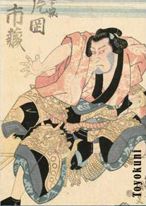 rechtes Blatt eines Kabuki-Diptychons, der Schauspieler Kataoka Ichizō I; aus der Sammlung Heide und Wolfgang Voelter, Tübingen